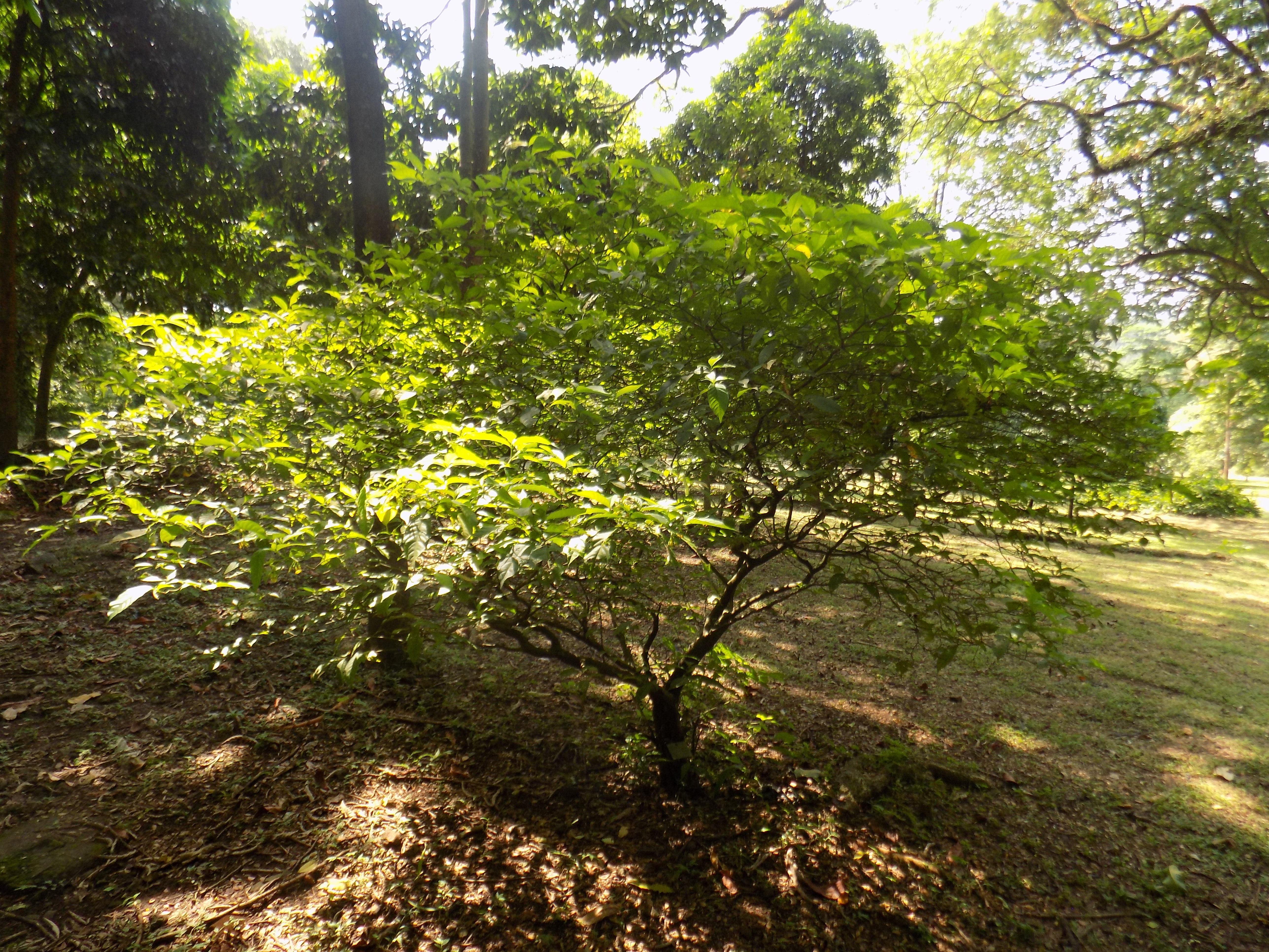 L'iboga (Tabernanthe iboga) est un petit arbuste de la famille des Apocynacées qui se rencontre en Afrique dans la forêt équatoriale. Jardin botanique de Limbé, Région du Sud-Ouest, Cameroun